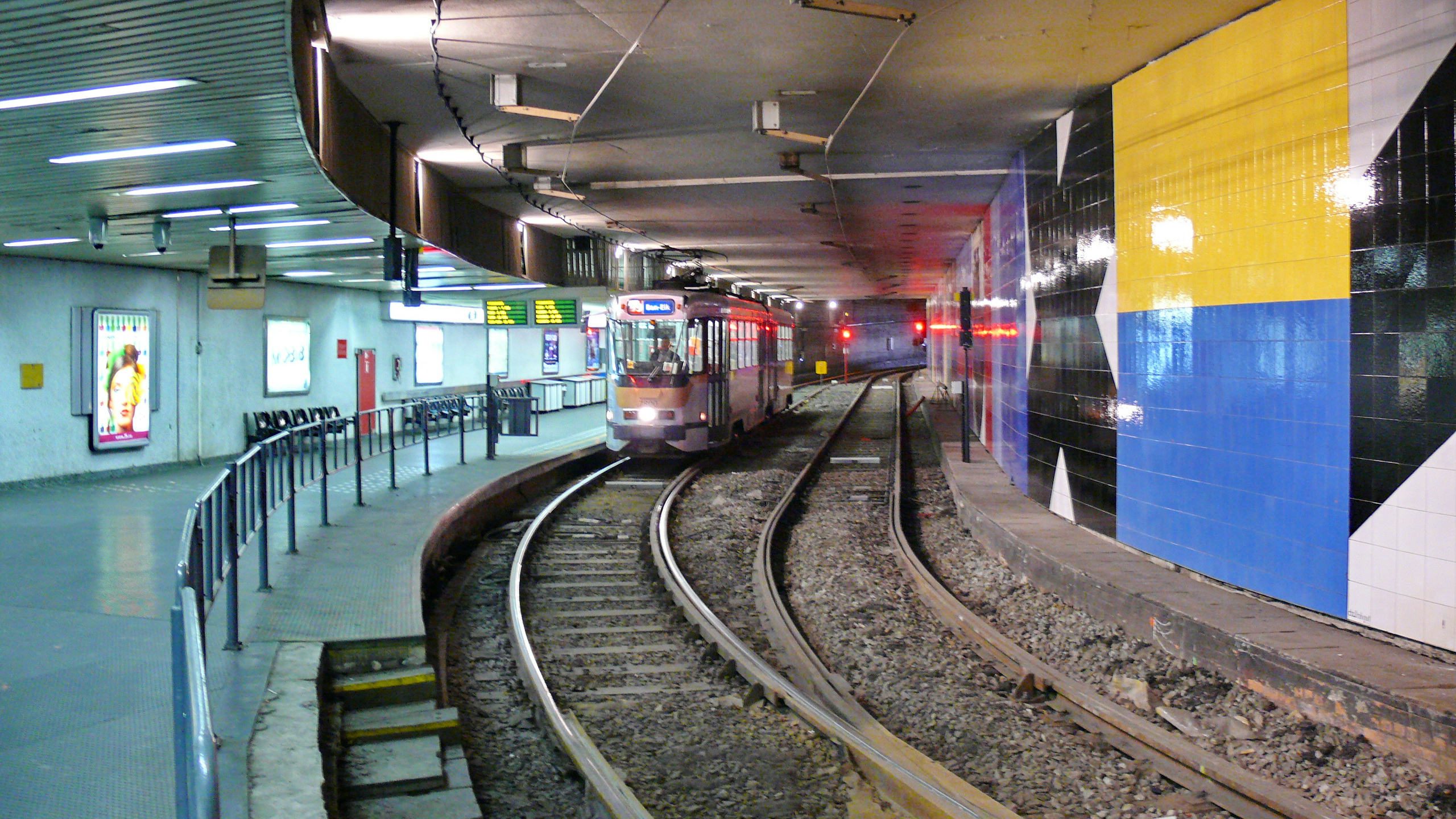 Tramway de Bruxelles : Rame 7800 (PCC 7700/7800) assurant la ligne 39, à son terminus souterrain de Montgomery